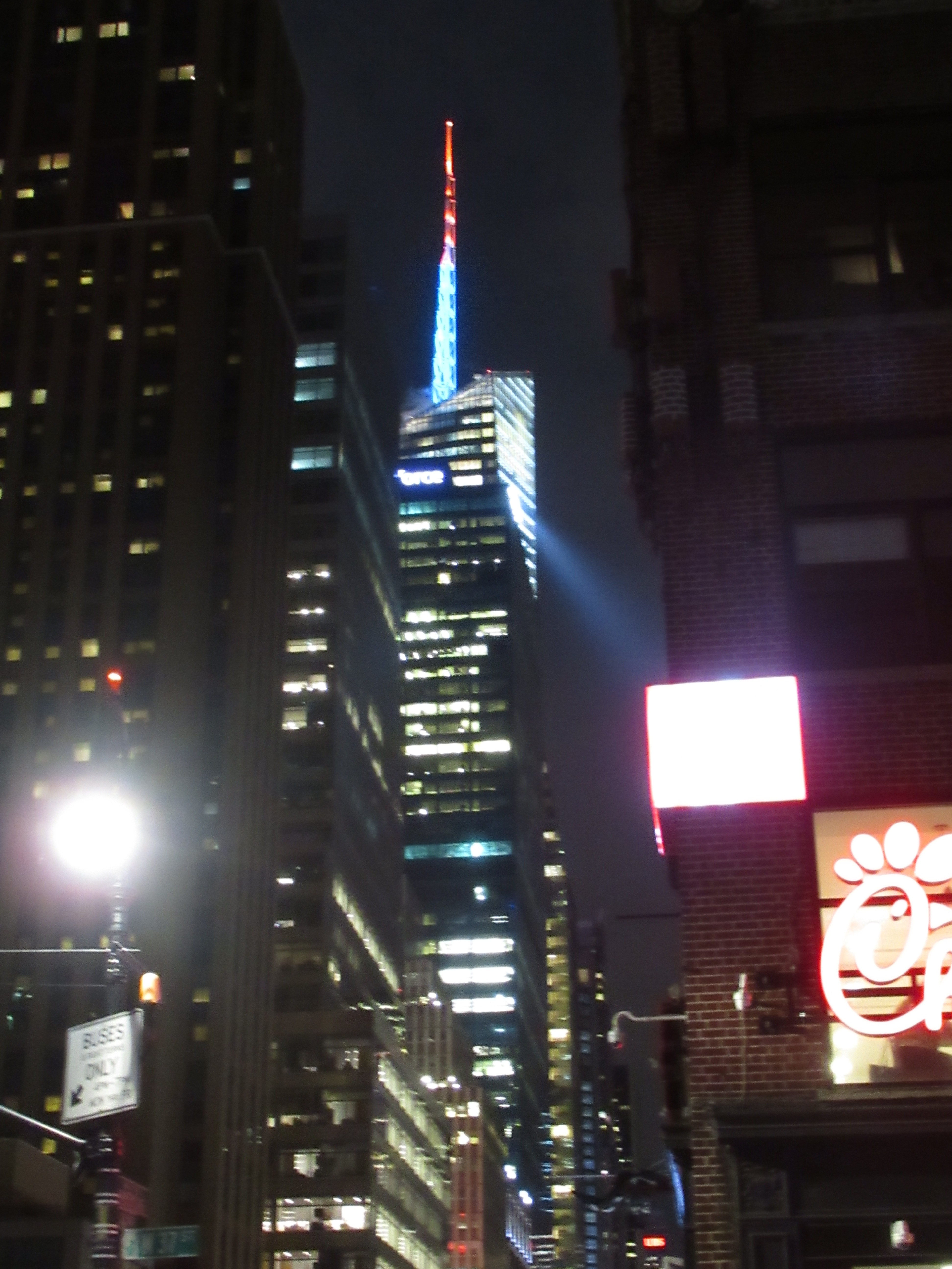 Bank of America Tower bei Nacht.